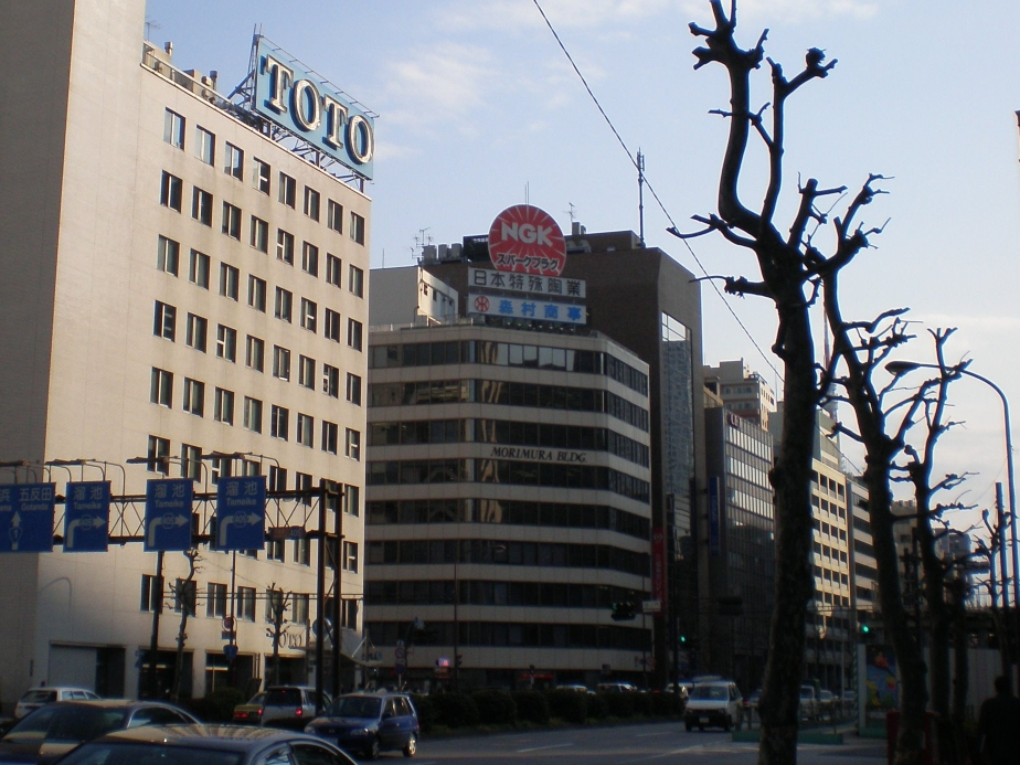 Morimura Building